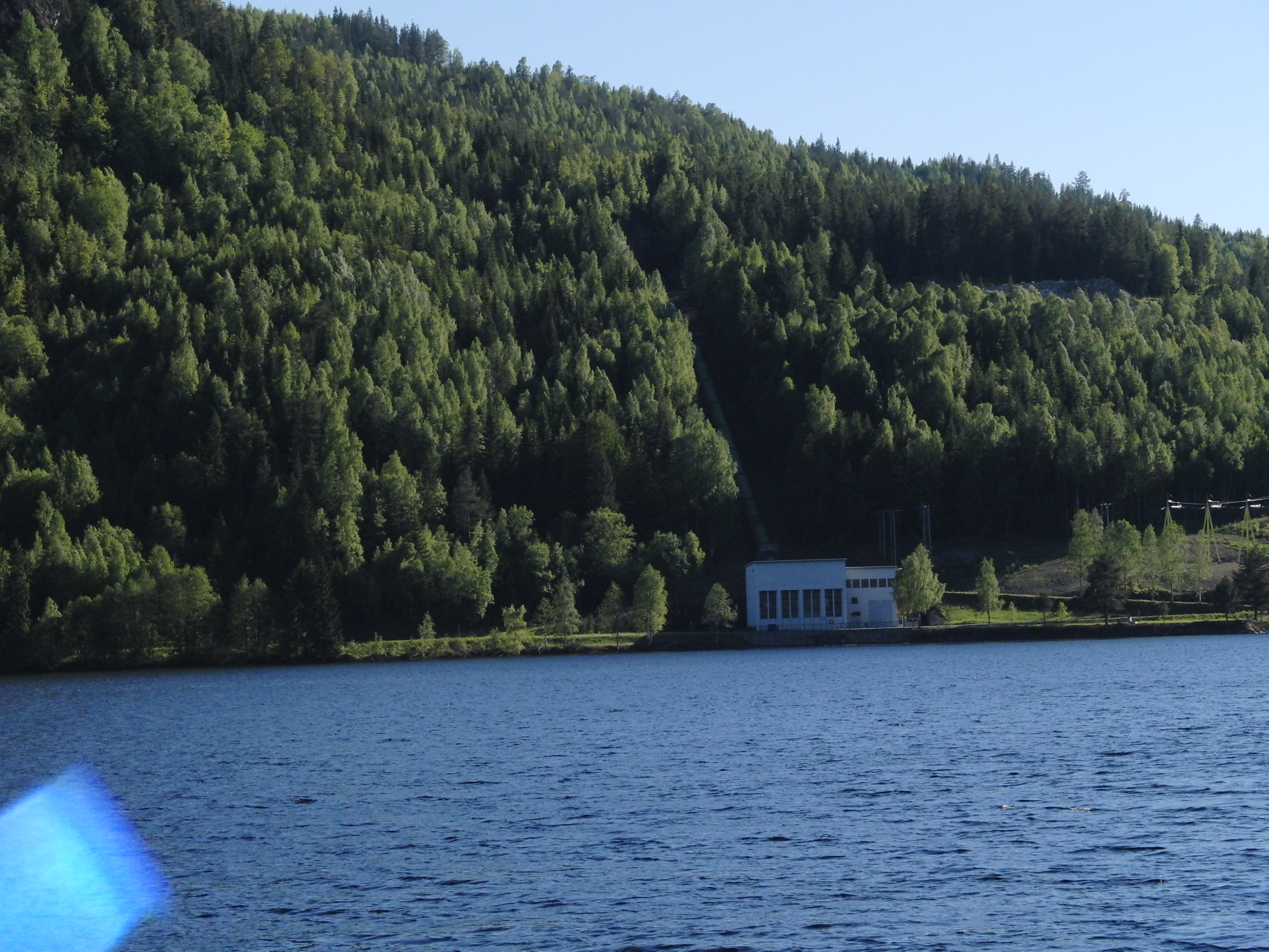 Osen kraftstasjon, Kviteseid